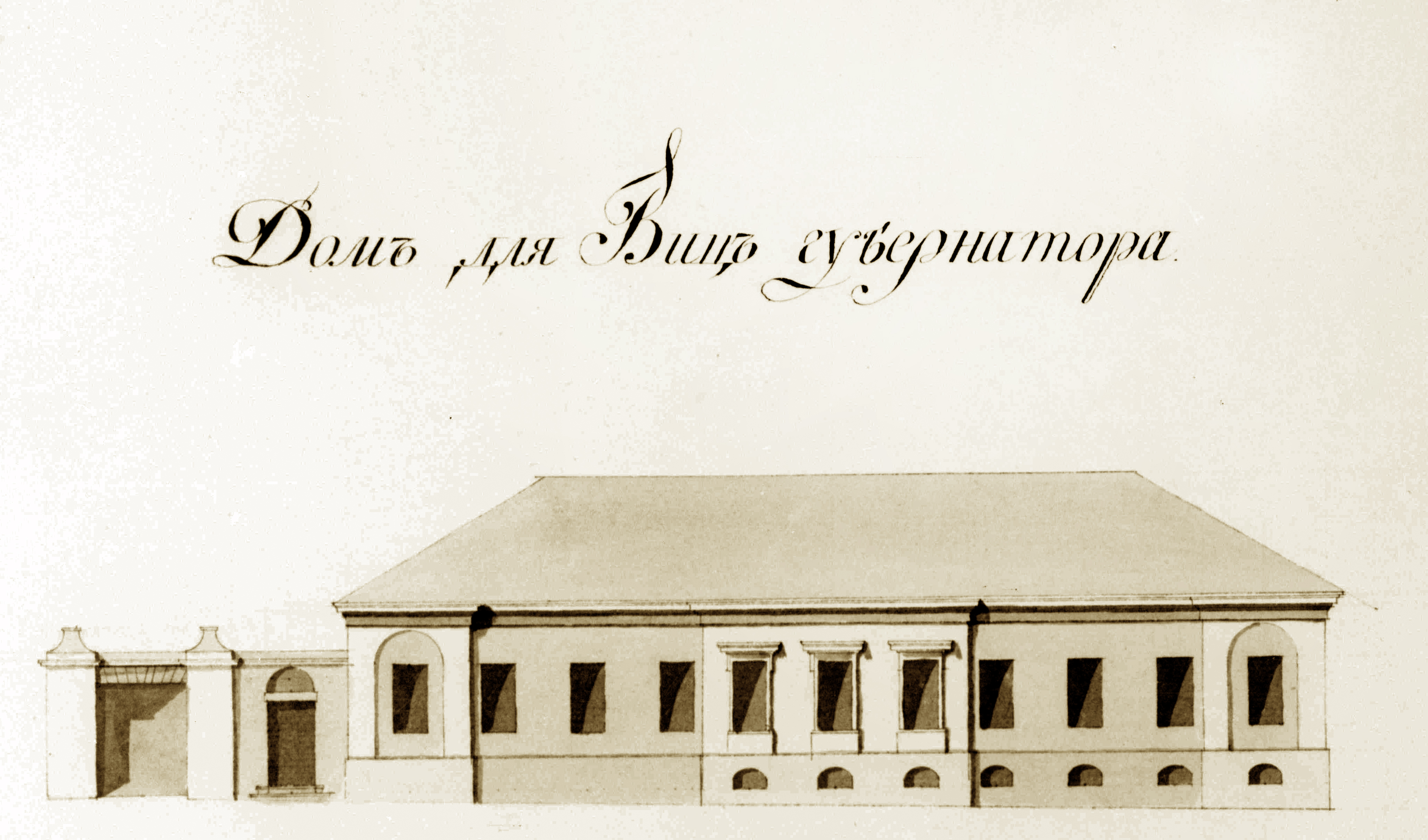 Беларуская (тарашкевіца): Менск (Miensk), вуліца Койданаўская (vulica Kojdanaŭskaja). Бурса езуіцкага калегіюму